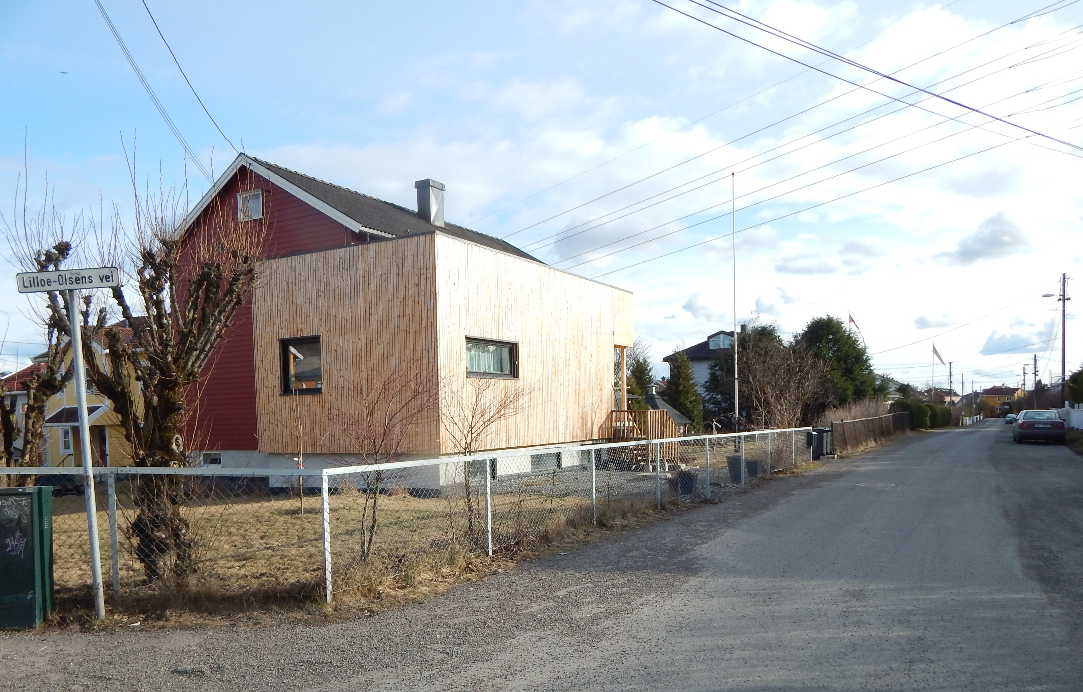 Lilloe-Olsens vei sett fra Saturnveien